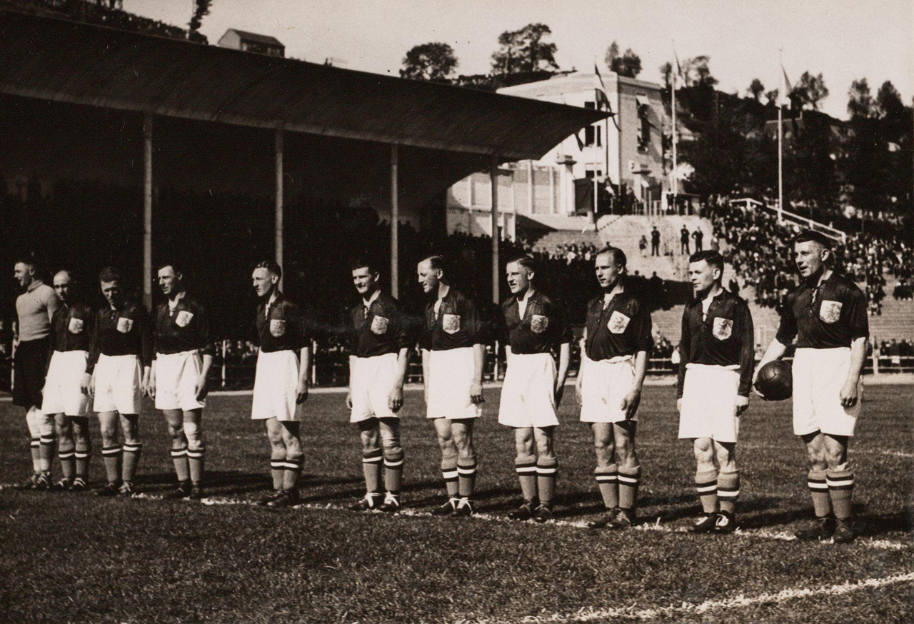 Nationaal Archief Beschrijving: Het Nederlands elftal voor de interland tegen Tsjechoslowakije. Van links naar rechts: Adri van Male, Bertus Caldenhove, Mauk Weber, Wim Anderiesen, Freek van der Veen, Kick Smit, Leen Vente, Bas Paauwe, Bertus de Harder, Frank Wels en Puck van Heel. Tsjechoslowakije - Nederland (0-3, na verlenging), gespeeld op 5 juni 1938 in het Stade Municipal in Le Havre tijdens de Wereldkampioenschappen. Opstelling: Adri van Male (Feyenoord), Mauk Weber (ADO), Bertus Caldenhove (DWS), Bas Paauwe (Feyenoord), Wim Anderiesen (Ajax), Puck van Heel (Feyenoord, aanvoerder), Frank Wels (Unitas), Freek van der Veen (Heracles), Leen Vente (Feyenoord), Kick Smit (Haarlem) en Bertus de Harder (VUC). Datum: 5 juni 1938 Vervaardiger: fotograaf onbekend Bestanddeelnummer: 3929 URL: [1] Voor meer informatie over het Nationaal Archief: Voor meer foto's uit deze en andere collecties, bezoek onze Beeldbank:, U kunt ons helpen onze kennis van de fotocollecties te verrijken door tags en commentaren toe te voegen. Herkent u mensen of locaties of heeft u een bijzonder verhaal te vertellen bij één van de foto's, laat dan een reactie achter (als u ingelogd bent bij Flickr) of stuur een mailtje naar